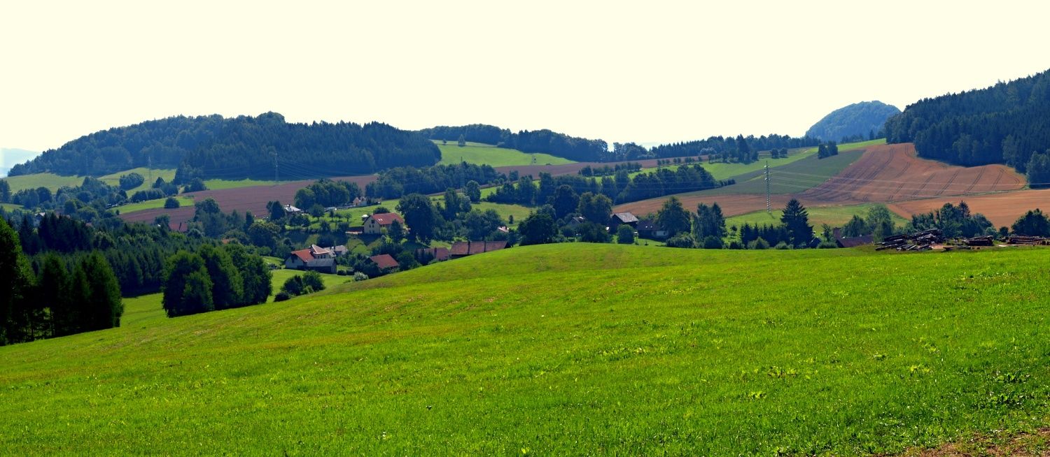 Celkový pohled na obec